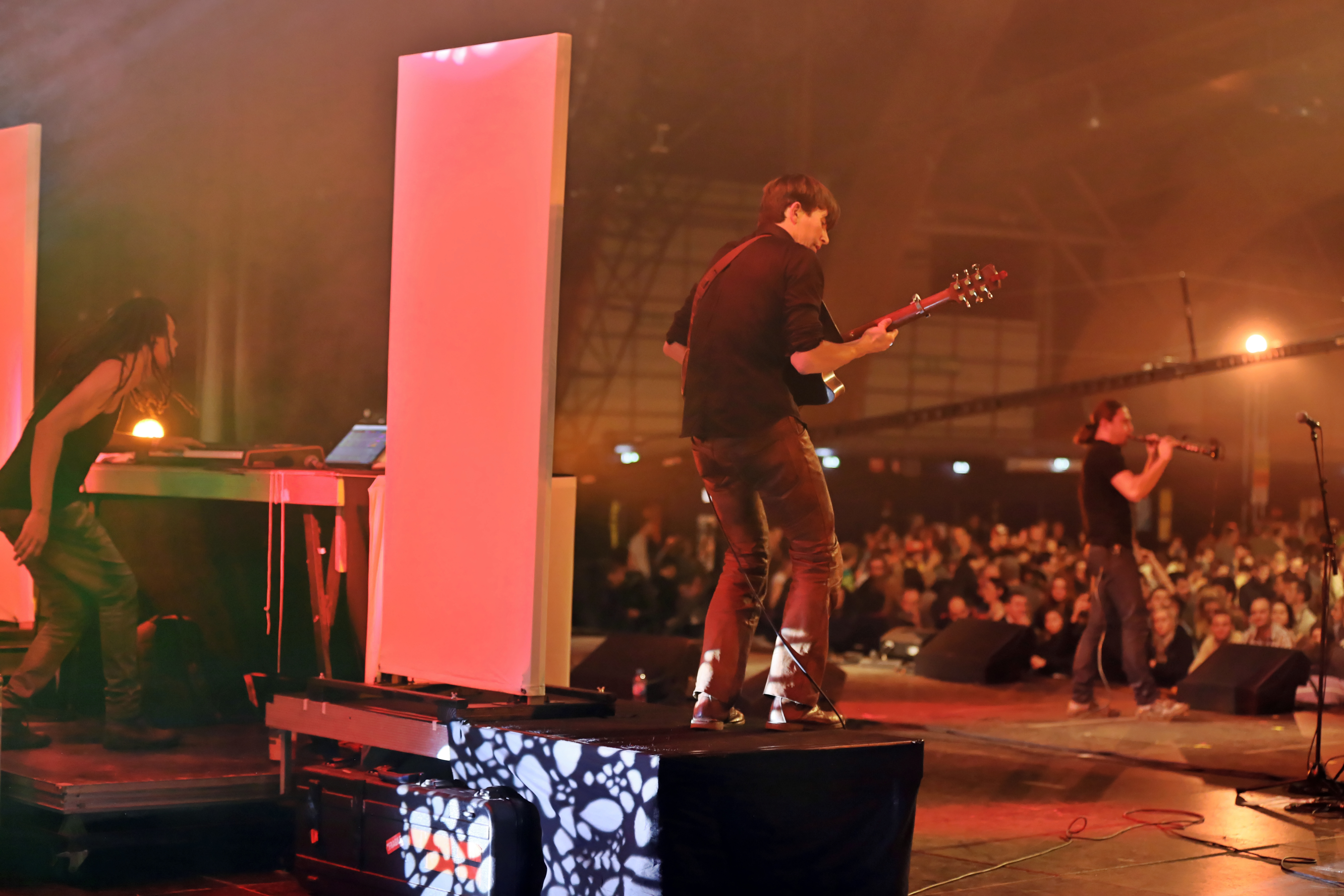 Plantec en fest-noz lors du festival Yaouank le 21 novembre 2015 au Parc des Expositions de Rennes.